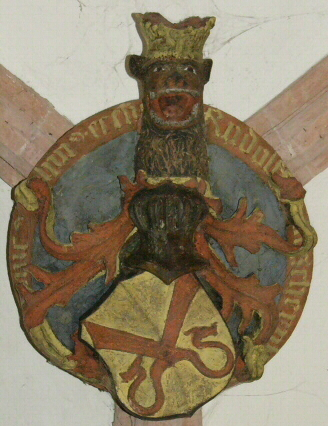 Wappen der Familie von Scherenberg, Gewölbe im Domkreuzgang des Würzburger Domes